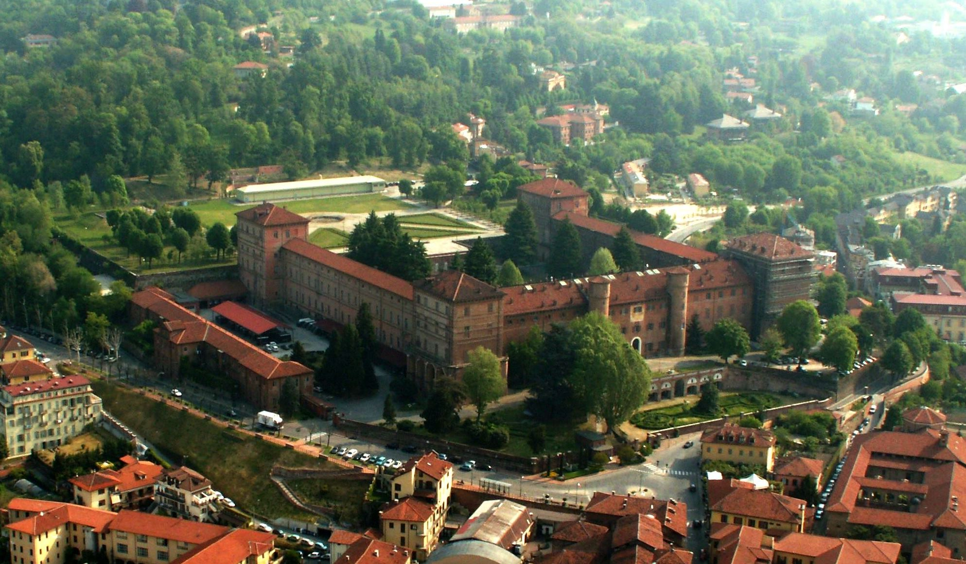 Vista aerea del castello reale di Moncalieri